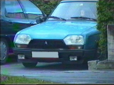 Citroen GSA X1; eigenes Fahrzeug, per Handycam abgelichtet